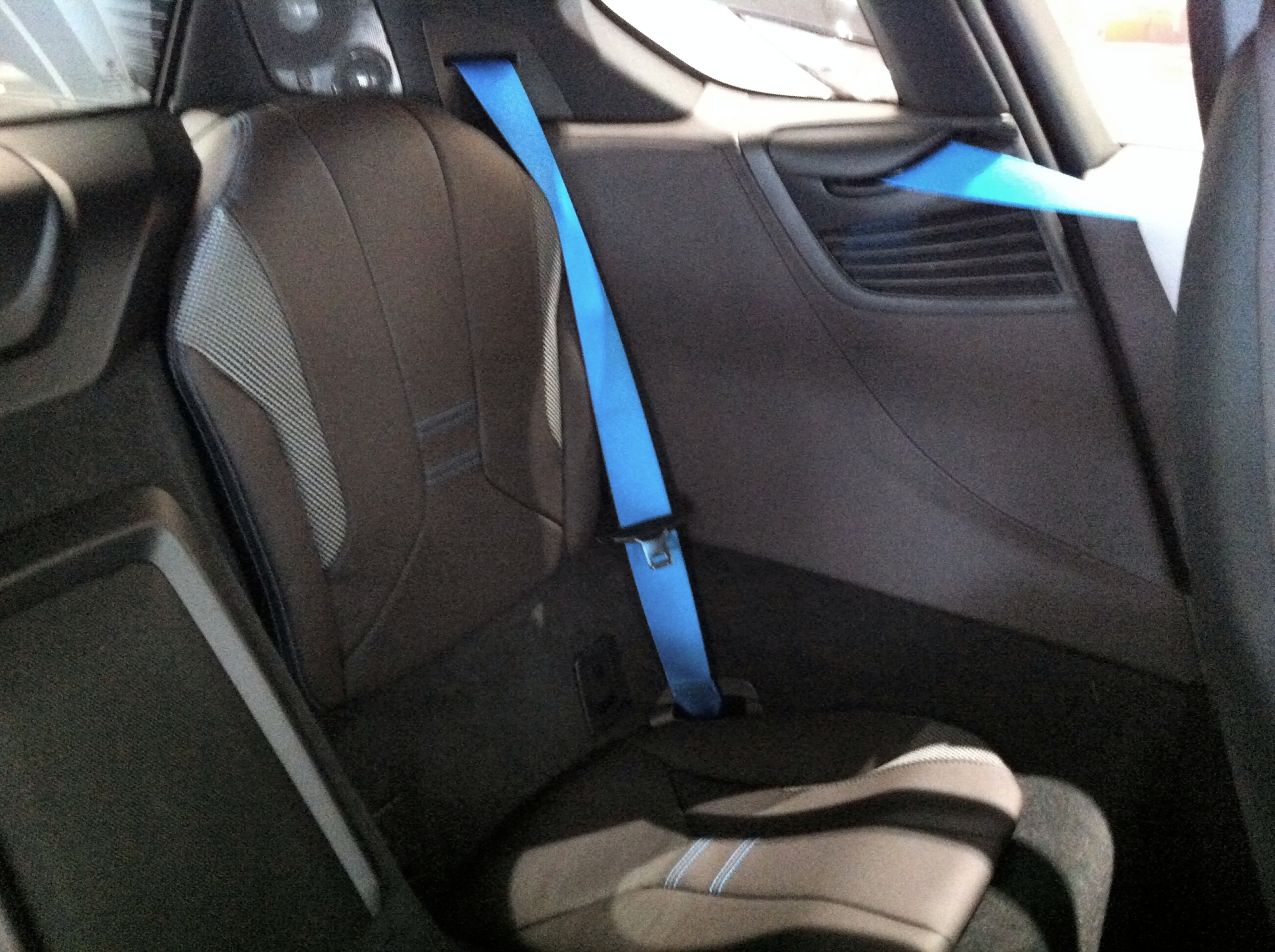 BMW i8 Rücksitzbank